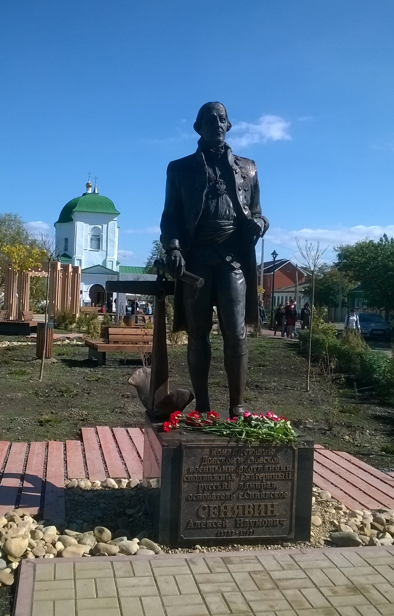 в селе Синявском Ростовской области поставлен памятник адмиралу Алексею Наумовичу Синявину